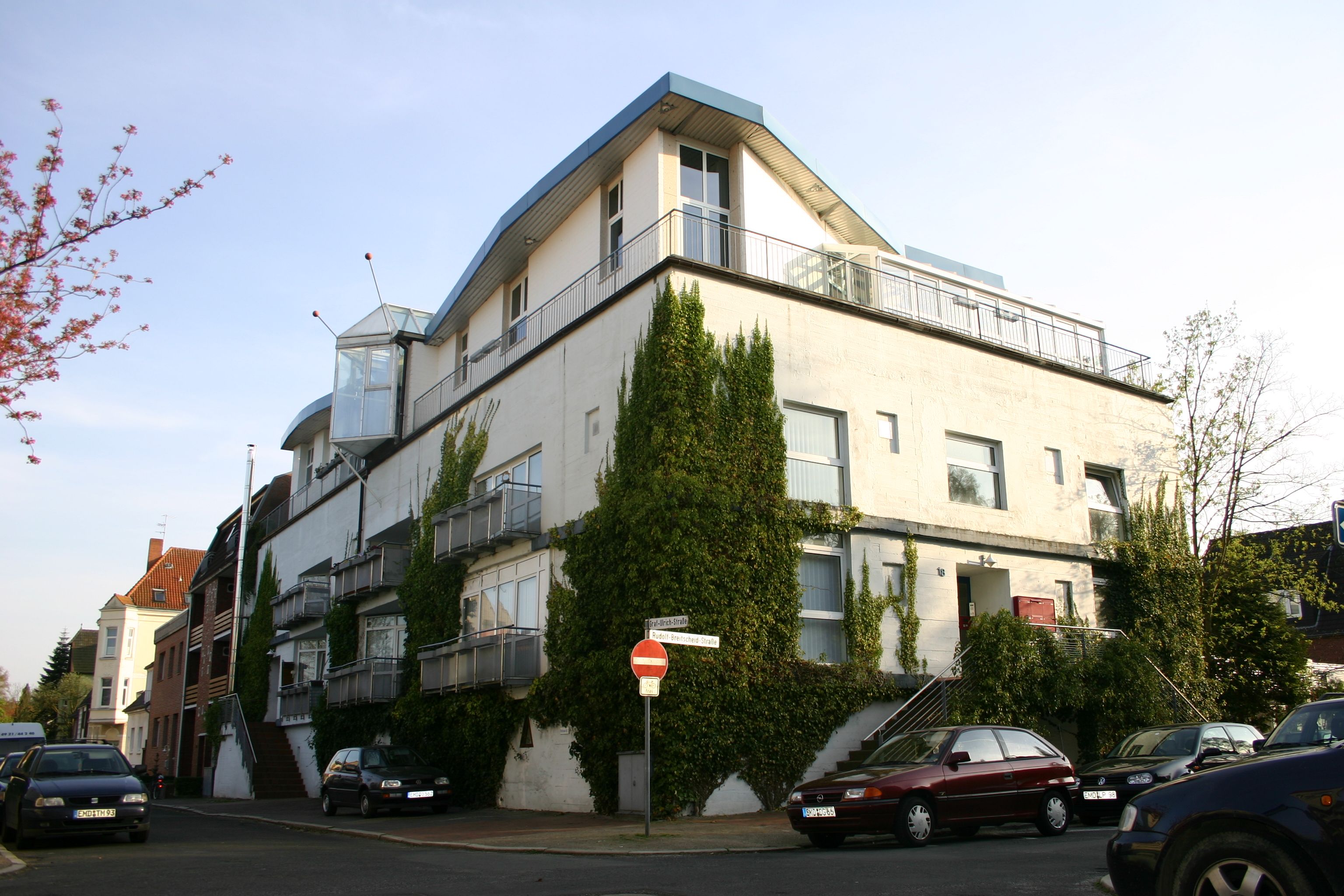 Zum Wohnhaus umgebauter Bunker im Emder Stadtteil Bentinkshof